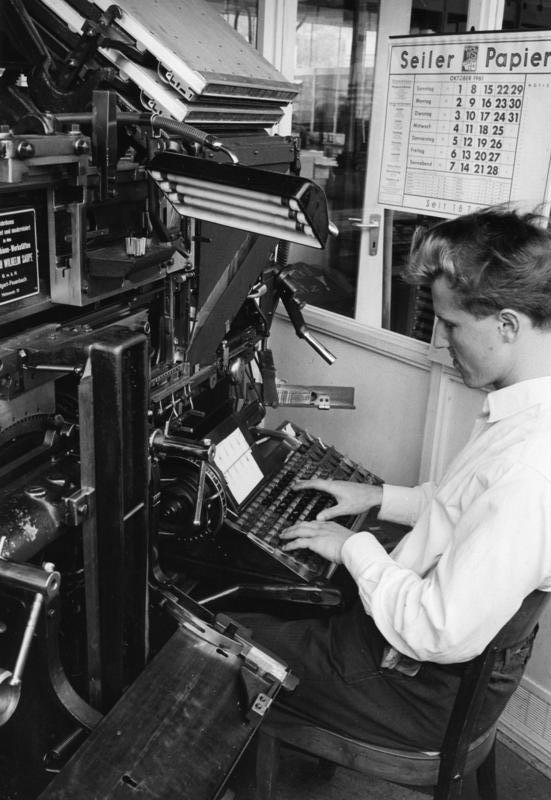 Firma Rheindruck in Boppard/Rheinland (Flüchtlingsbetrieb) Maschinensetzer an der Linotype-Setzmaschine